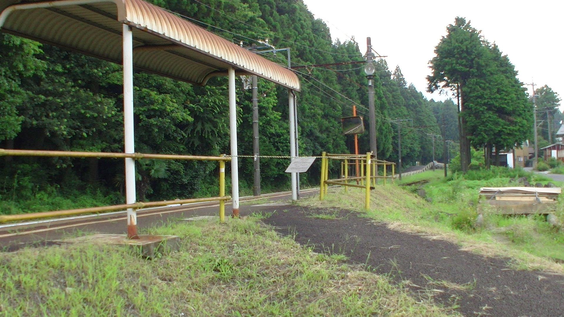 三岐鉄道三岐線 2012年6月27日の東藤原駅電気機関車脱線事故によりバス代行輸送実施。構内立ち入り禁止状態の西野尻駅